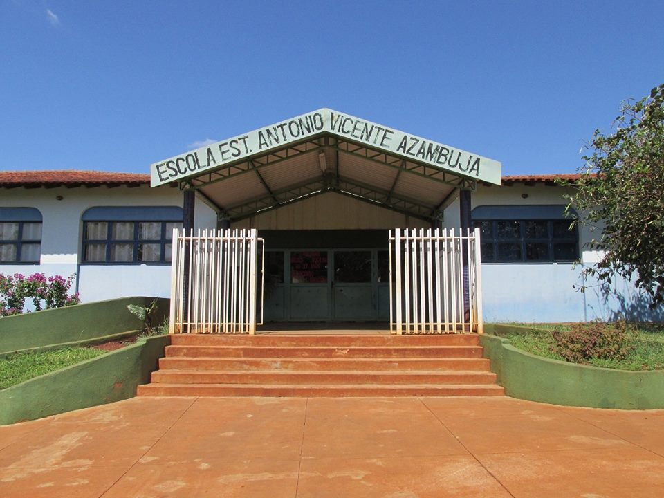 A Escola Estadual Antonio Vicente Azambuja oferta ensino fundamental e médio no distrito de Itahum, MS.